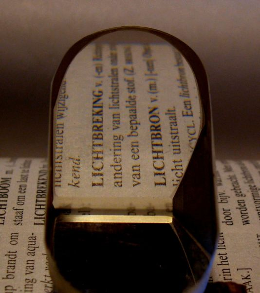 Lichtbreking door prisma eigen photographie